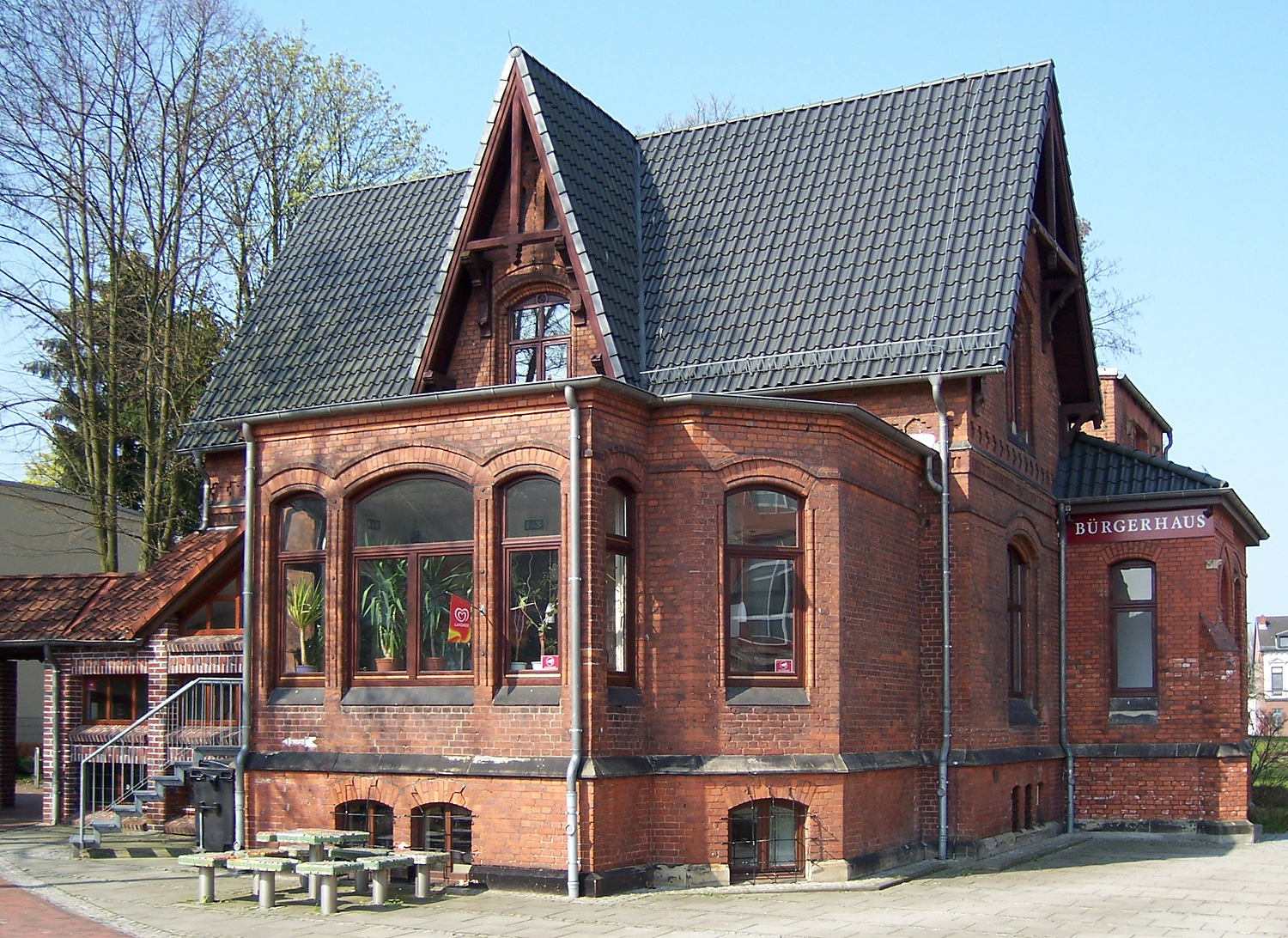 Bremen-Hemelingen: Bürgerhaus in der Godehardstraße, die Alte Villa der Familie Wilkens aus dem 19. Jh.